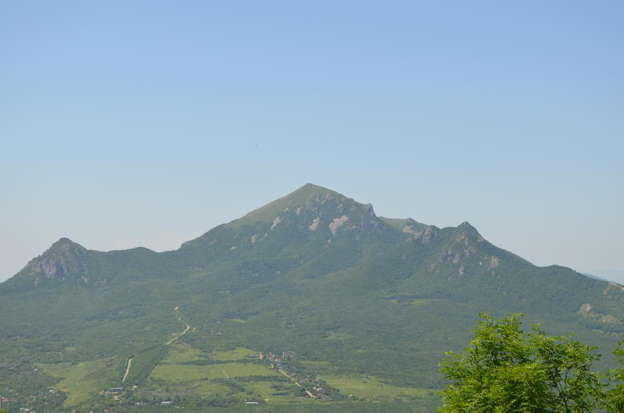 Вид на гору Бештау с вершины горы Машук